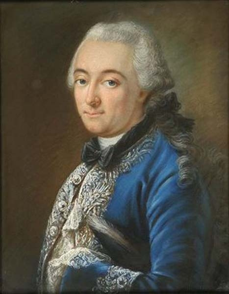 Jacob Friedemann Graf von Werthern, u.a. Besitzer des Gutes Eythra